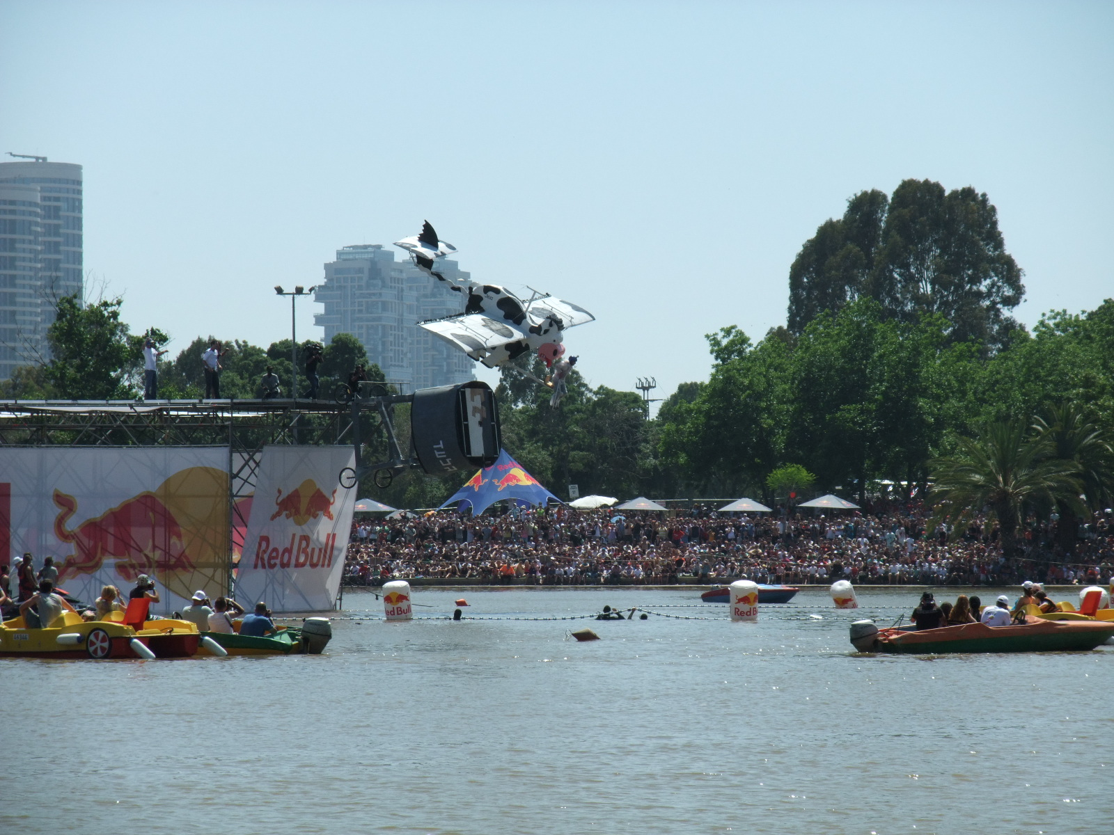 כלי הטיס של קיבוץ גלעד בתחרות רד בול פלוגטאג 2011